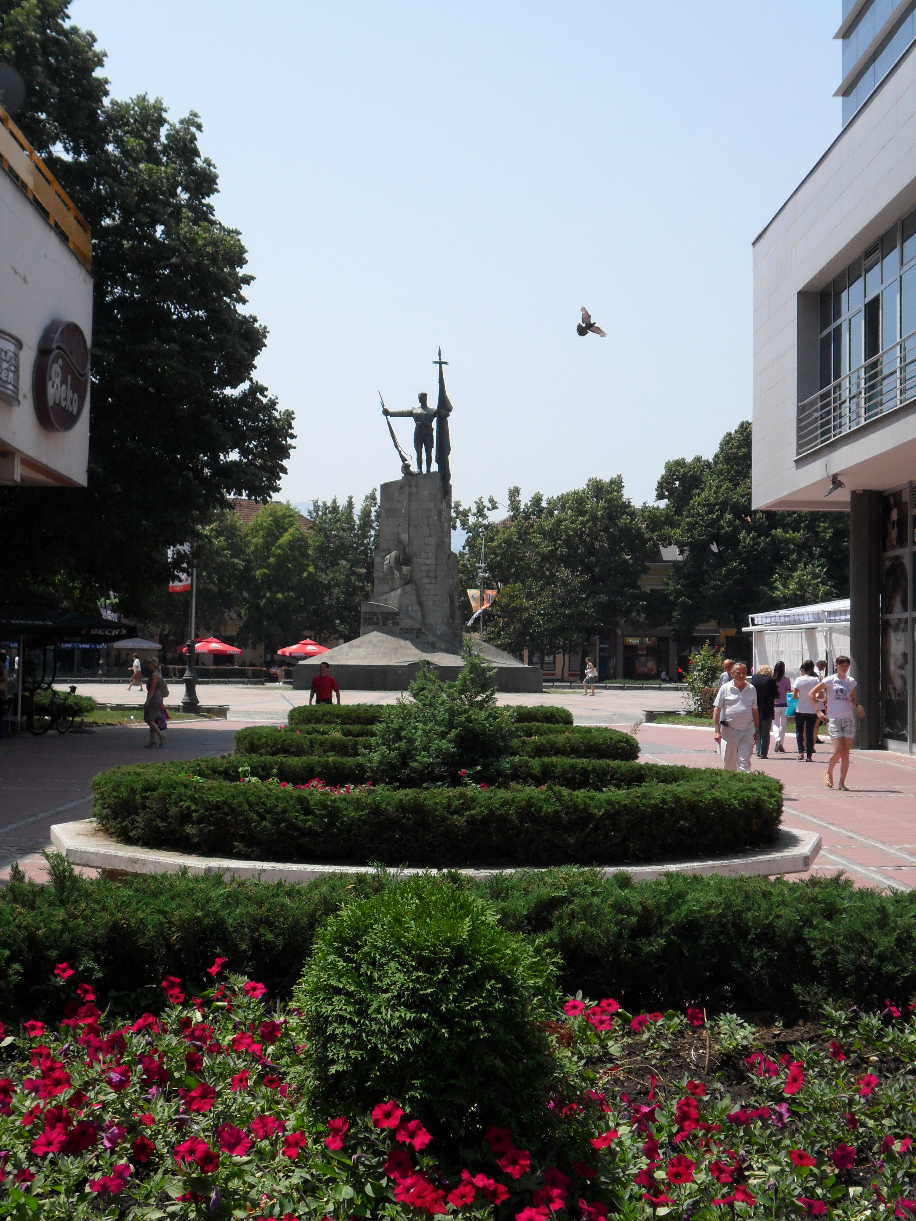 Spomenik na centralnom gradskom trgu u Kraljevu